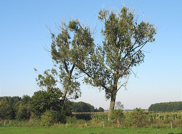 Schwarzpappelhybriden nahe der Ortschaft Linde bei Löwenberg in Brandenburg Selbst fotografiert und gemeinfrei